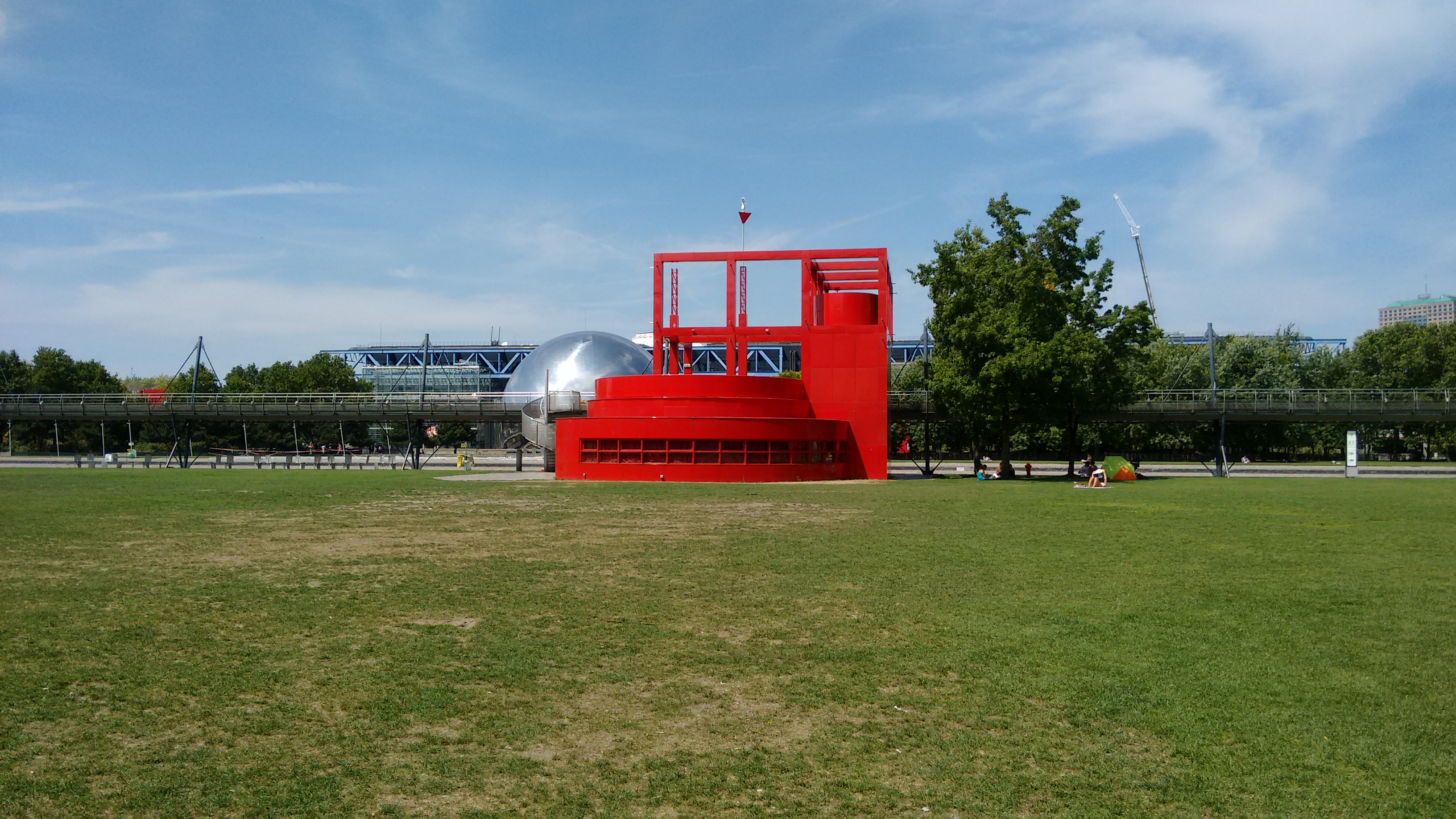 Cores no La Villete